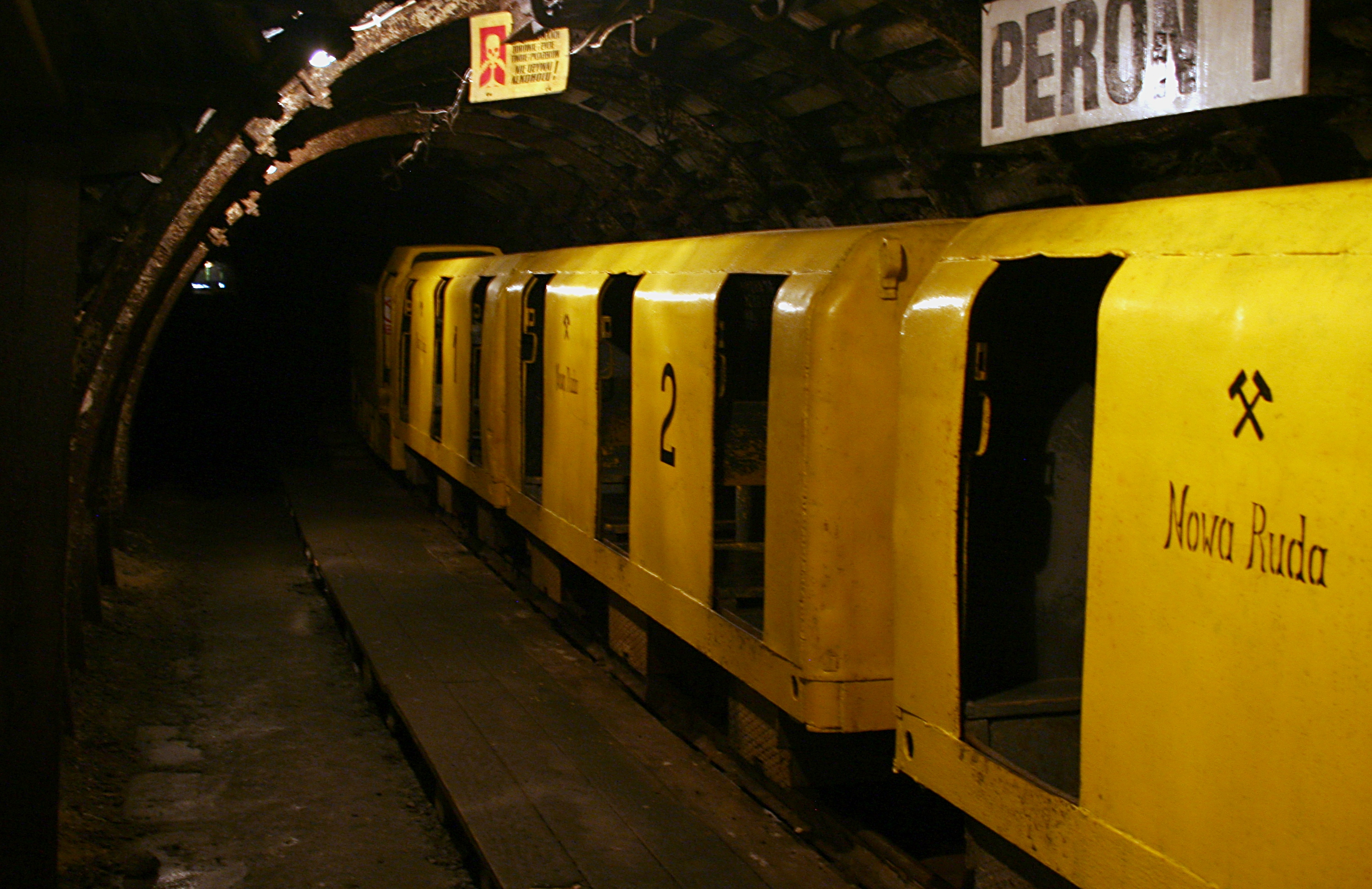 Wagoniki kolejki - Podziemna Trasa Turystyczna na miejscu dawnej kopalni Nowa Ruda